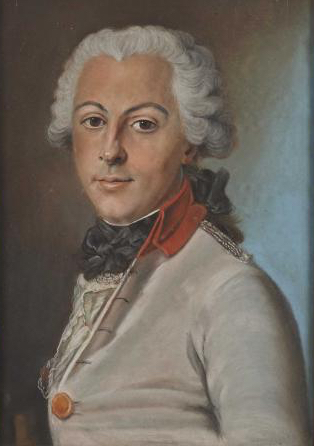 Prince Eugène Marie Louis Hilarion de Savoie